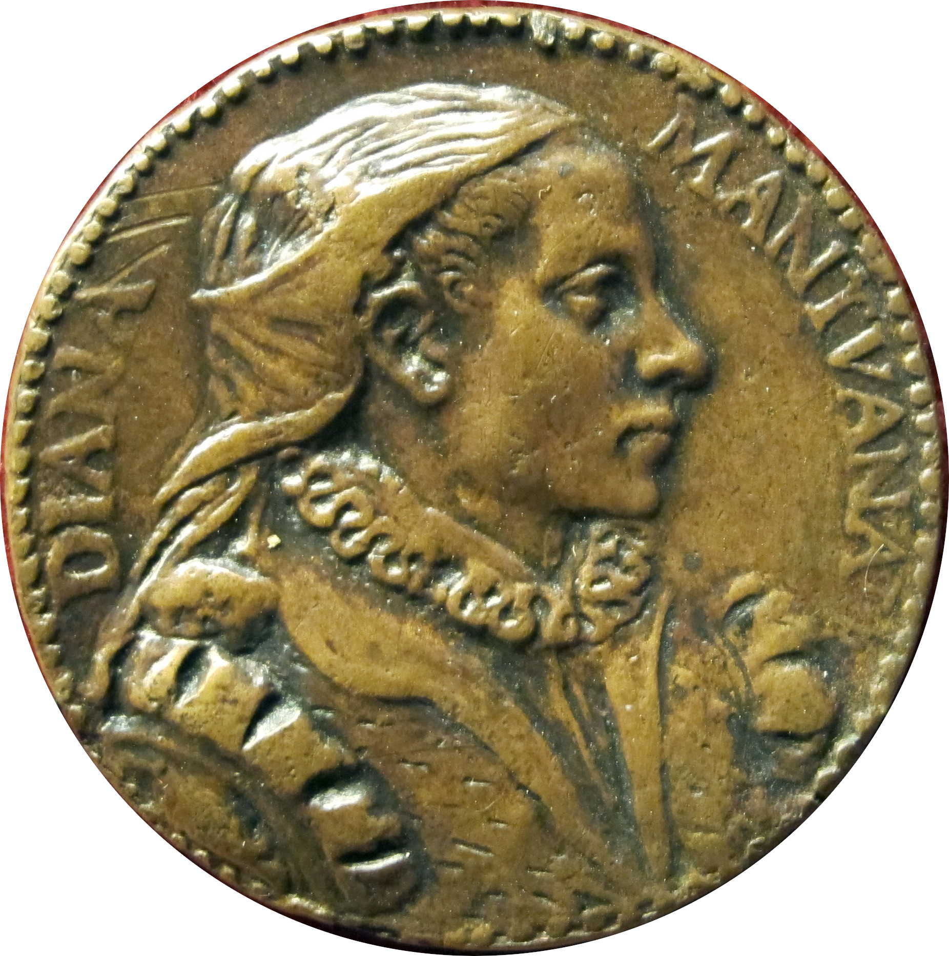 Diana Guisi, moglie di Francesco Capriani, vedi titolo